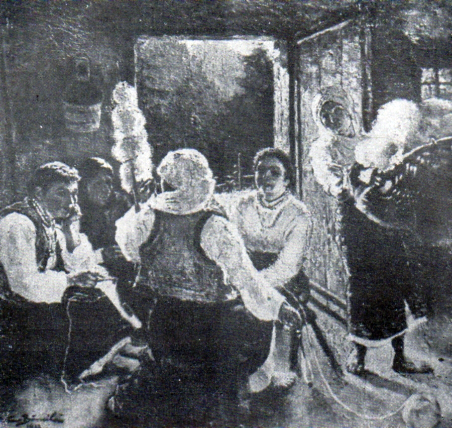 La sfat - variantă pentru ciclul de lucrări 1907. Este cunoscută și sub denumirea de La șezătoare. Pictura apare reprodusă în monografia publicată de către Maria Epure - Octav Băncilă, București 1956